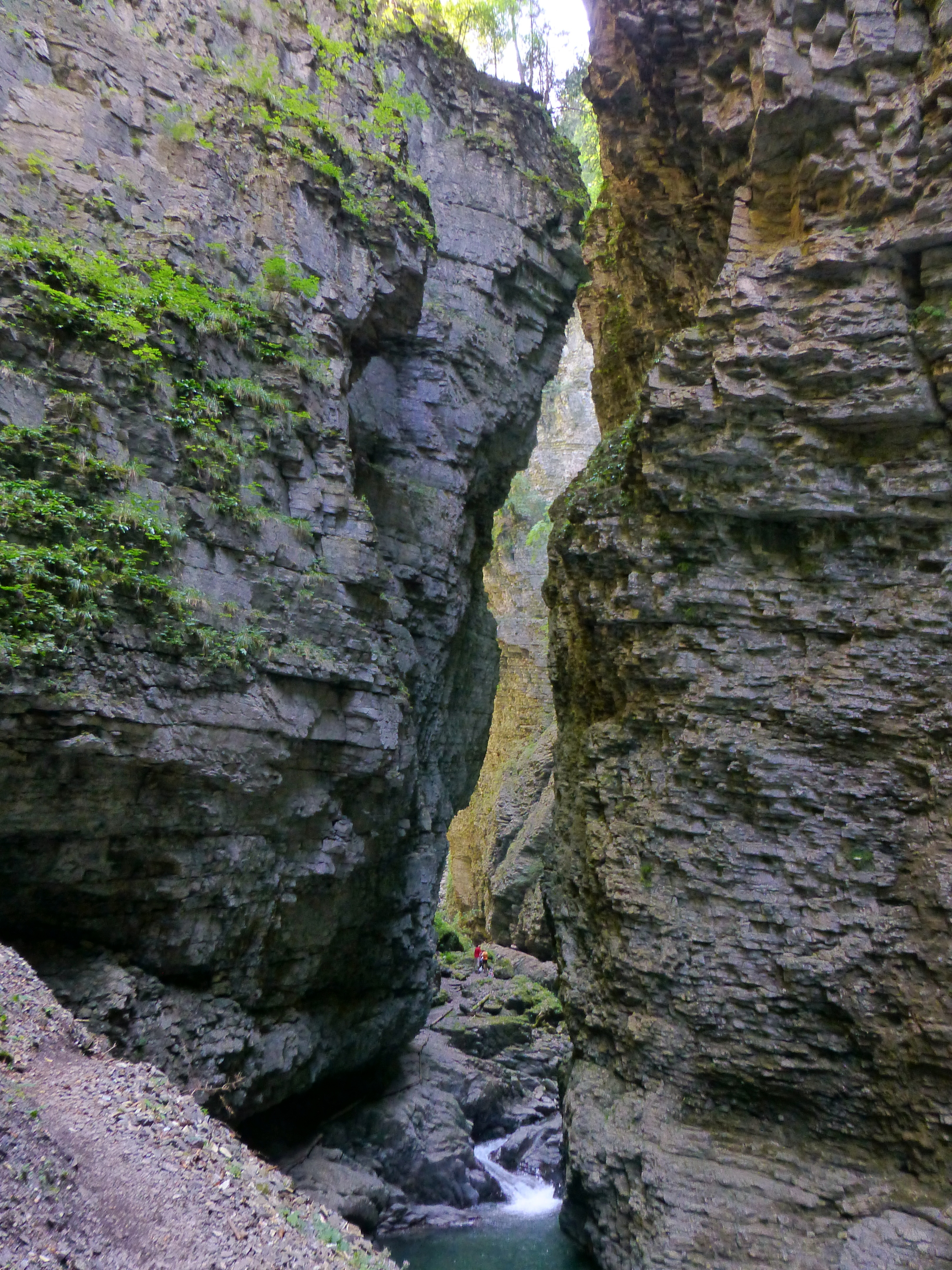 die Üble Schlucht in der österreichischen Gemeinde Laterns